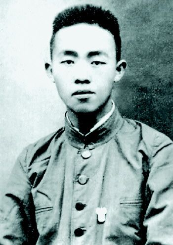 邓恩铭，中共一大代表，中国共产党的创始人之一